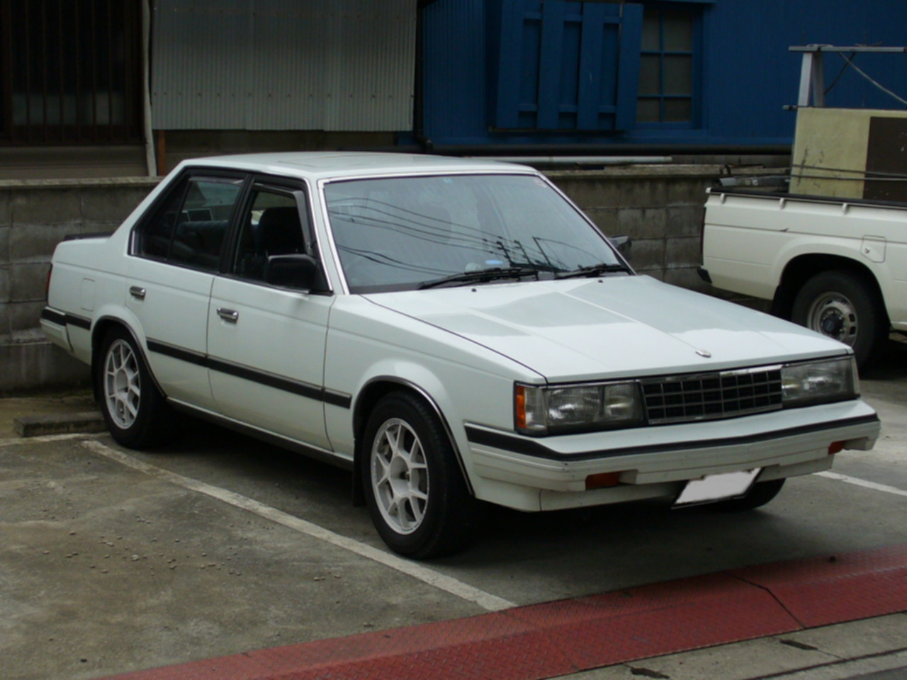 後期型.